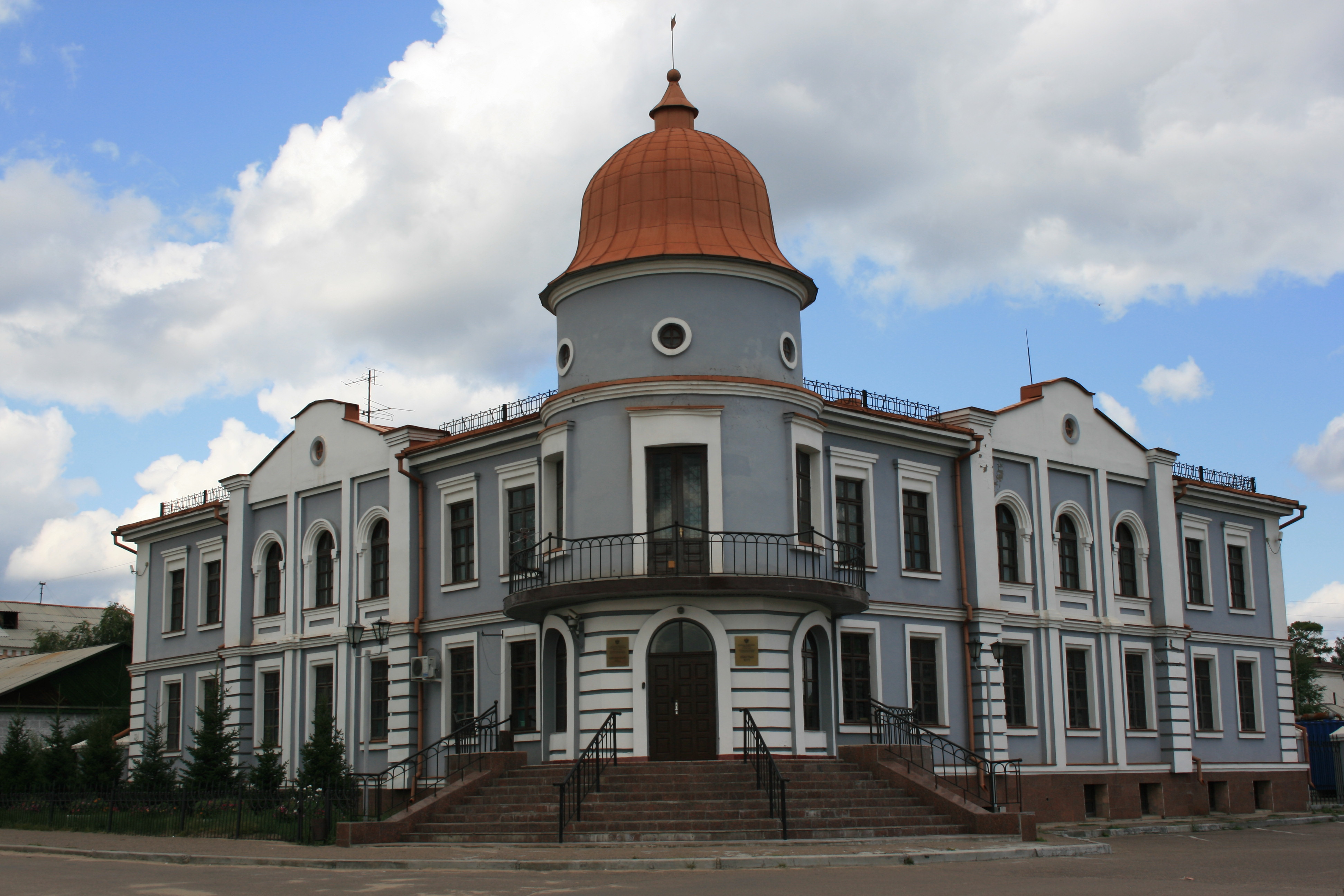 Кяхтинский РКЦ национального банка Бурятии. Улица Банзарова 22а, г. Кяхта, Бурятия